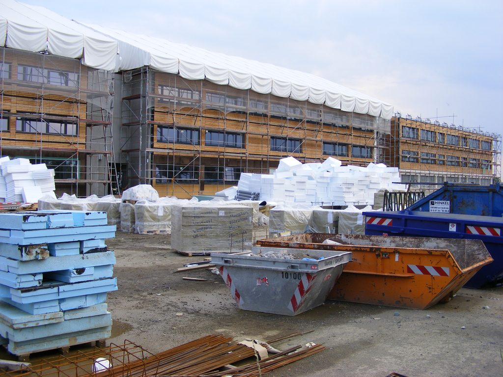 Großbaustelle der Firma JUWI in Wörrstadt